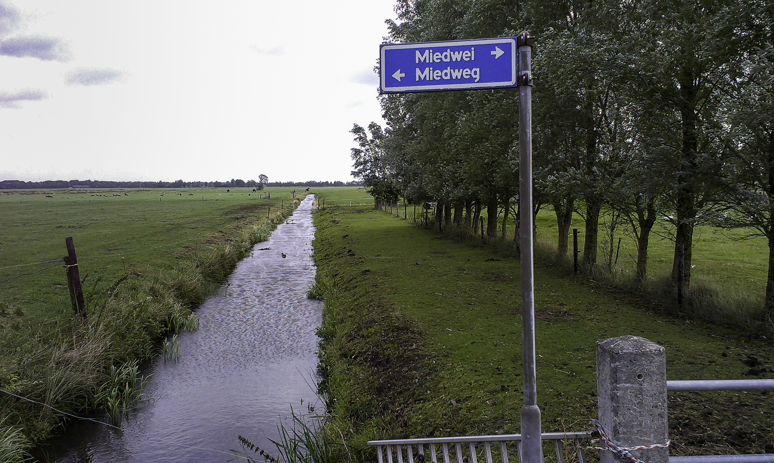 Overgang Nederlandse naam Miedweg in Friese naam Miedwei bij Surhuizumer Mieden